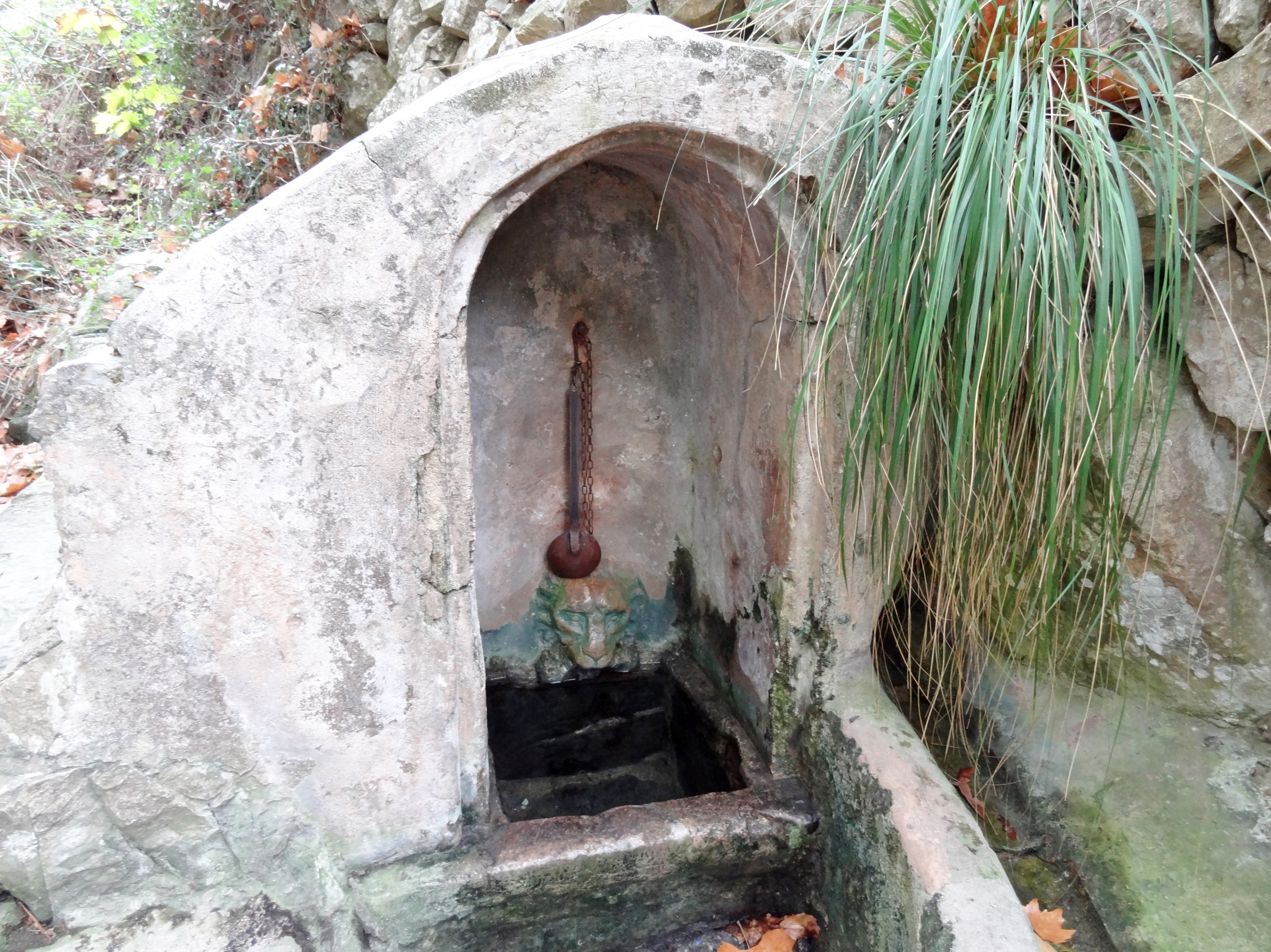 Die Quelle Font de s’Ermita nahe der Ermita de Betlem, Gemeinde Artà, Mallorca, Spanien